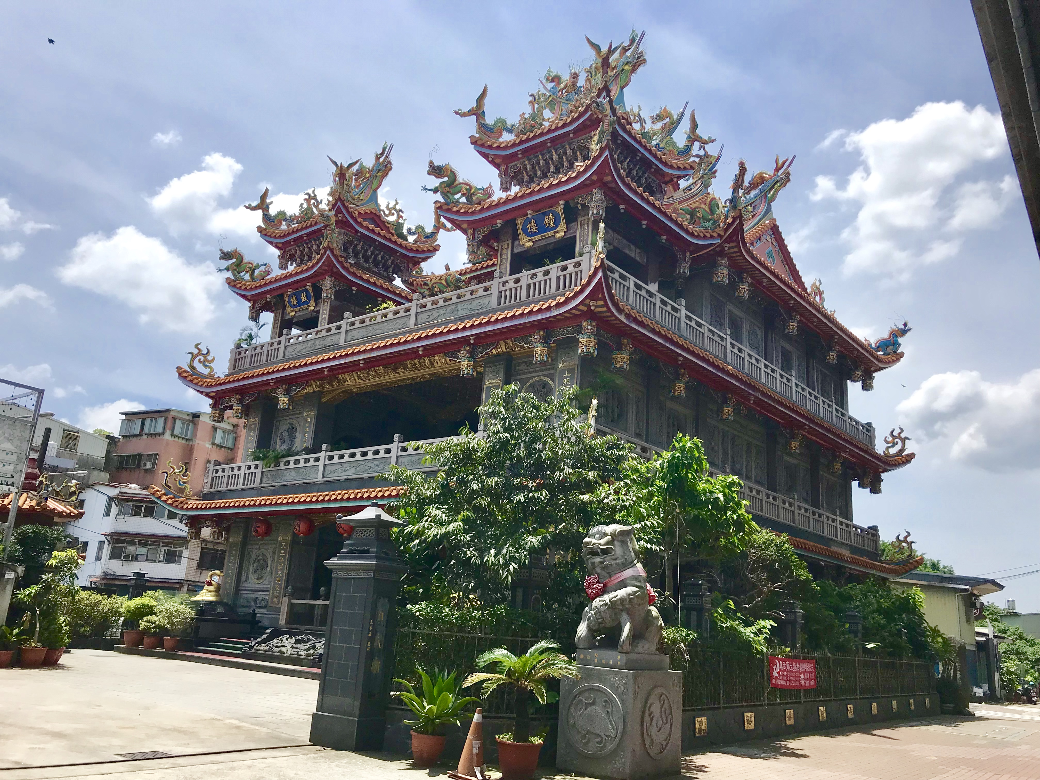 中文（台灣）: 板橋真武廟